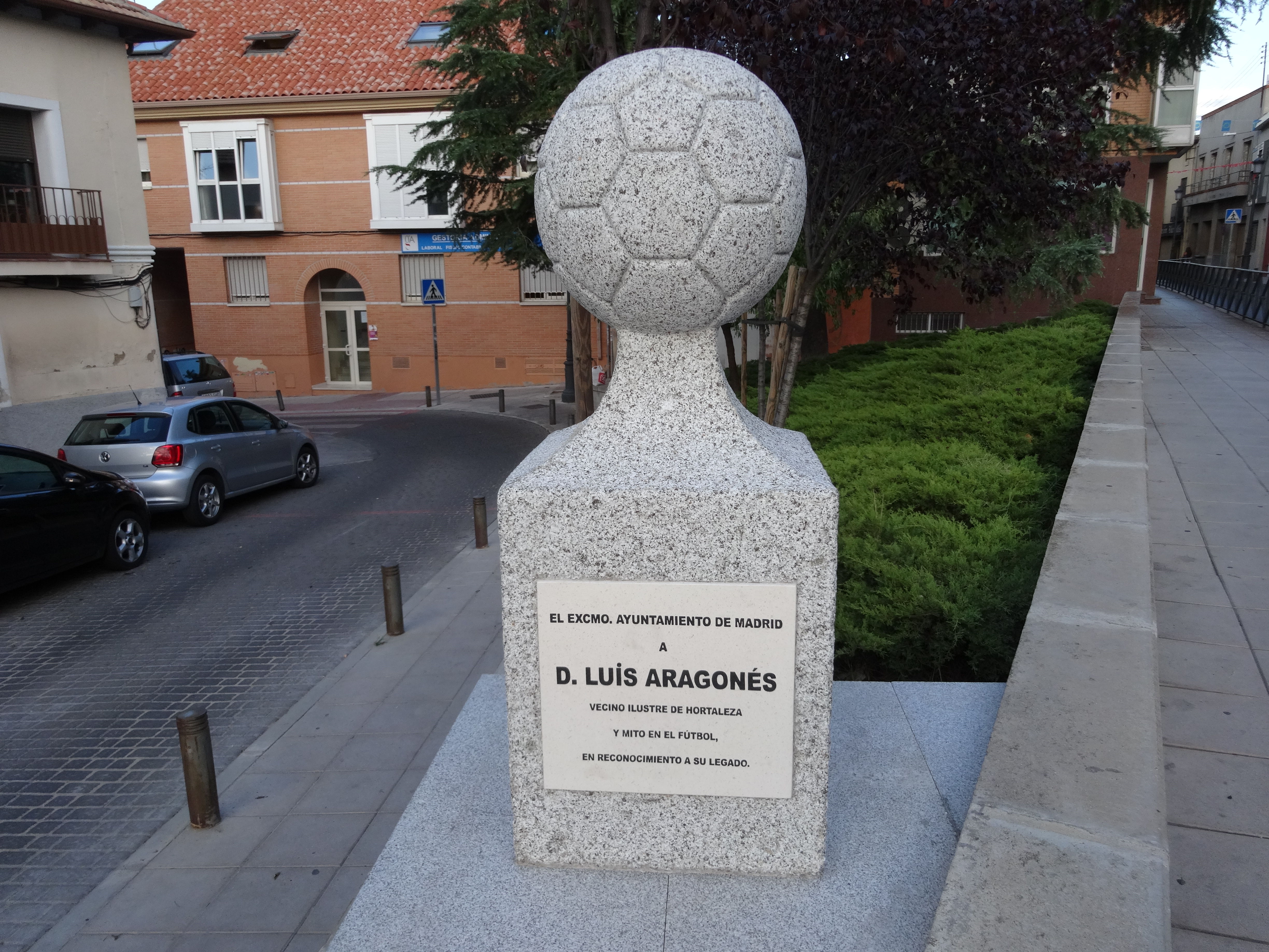 Homenaje y reconocimiento del Ayuntamiento de Madrid al tristemente fallecido Luis Aragonés en el barrio de Hortaleza.